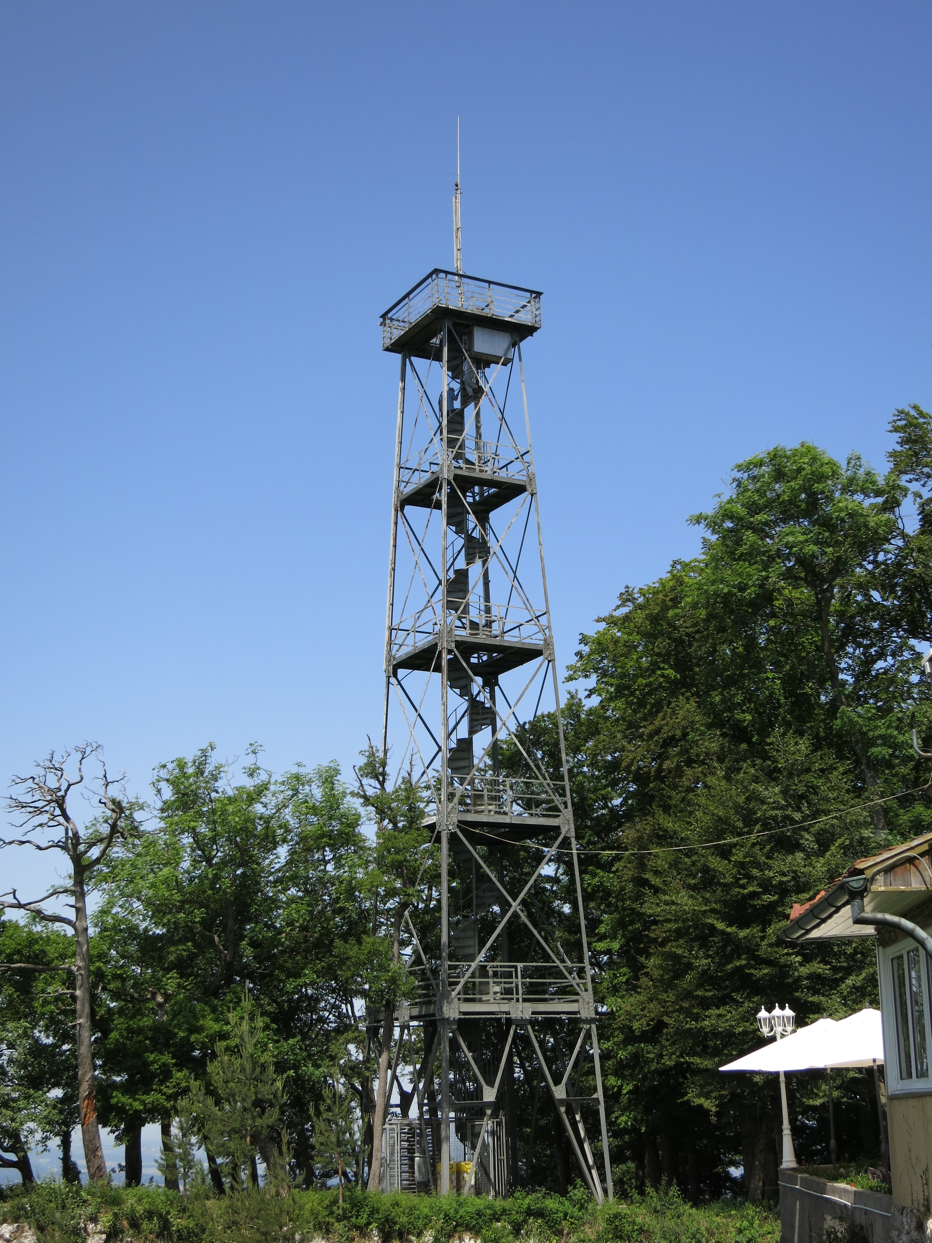 Gempenturm